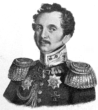 Генерал-адъютант Шипов Сергей Павлович